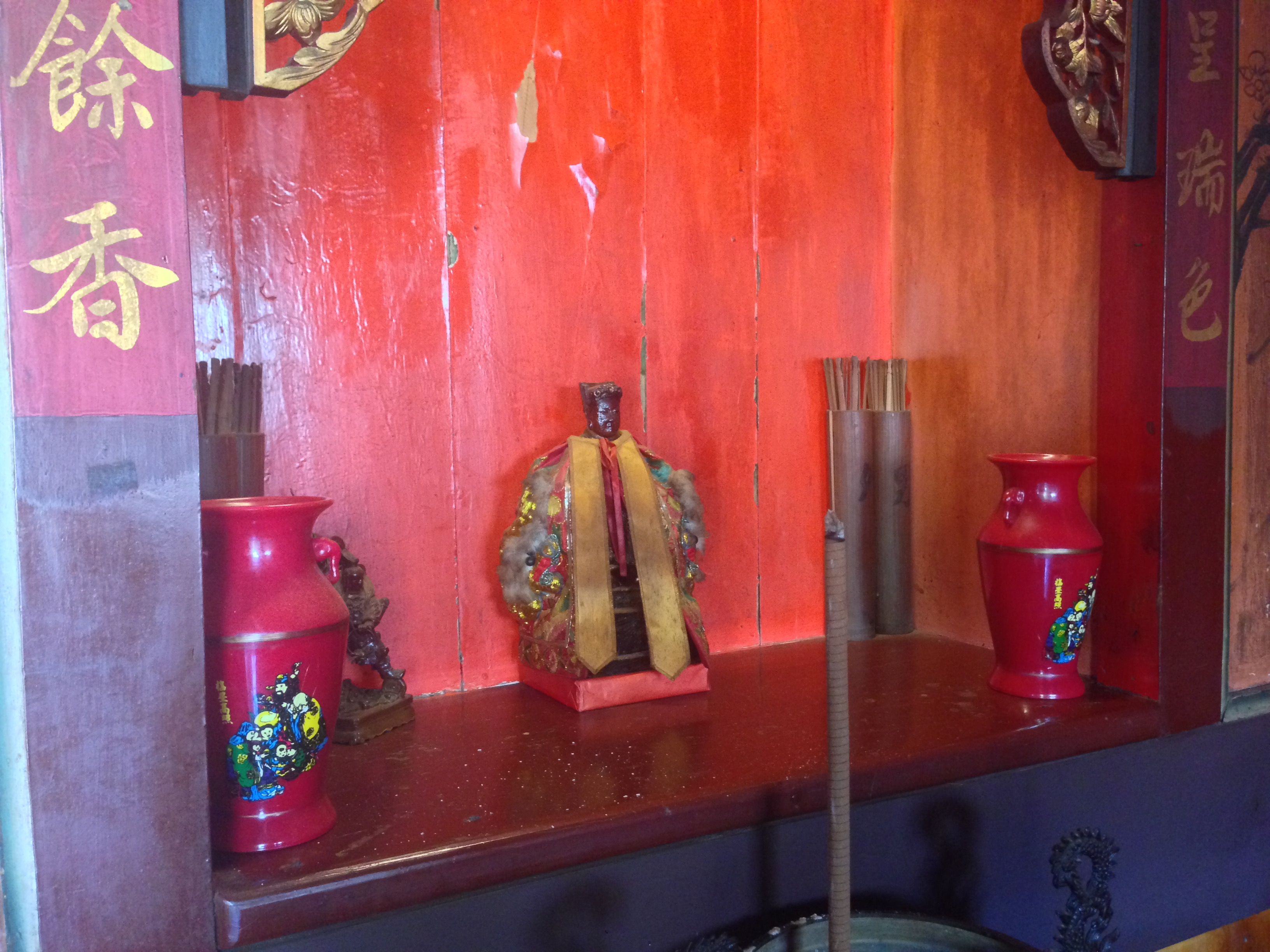 利澤簡廣惠宮的灶君神像。